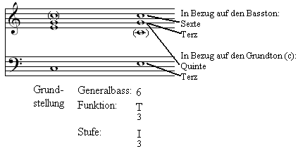 Sextakkord1